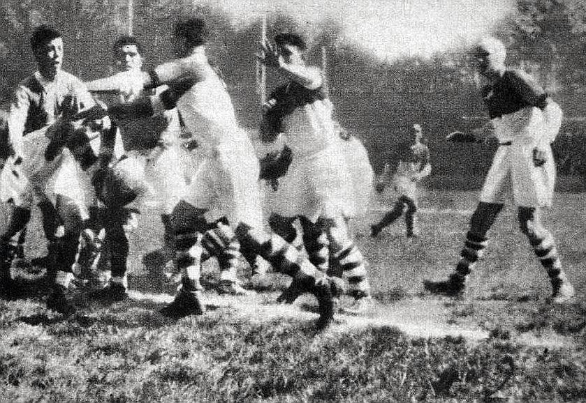 1937 (25 avril), Biarritz (maillot foncé et blanc) gagne le Challenge Yves du Manoir, de nouveau face à l'USAP au Stade des Ponts Jumeaux de Toulouse (attaque du biarrot Beaux).